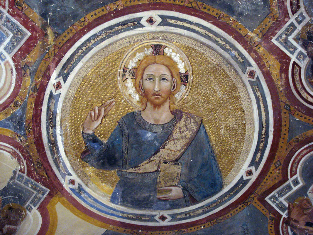 detail